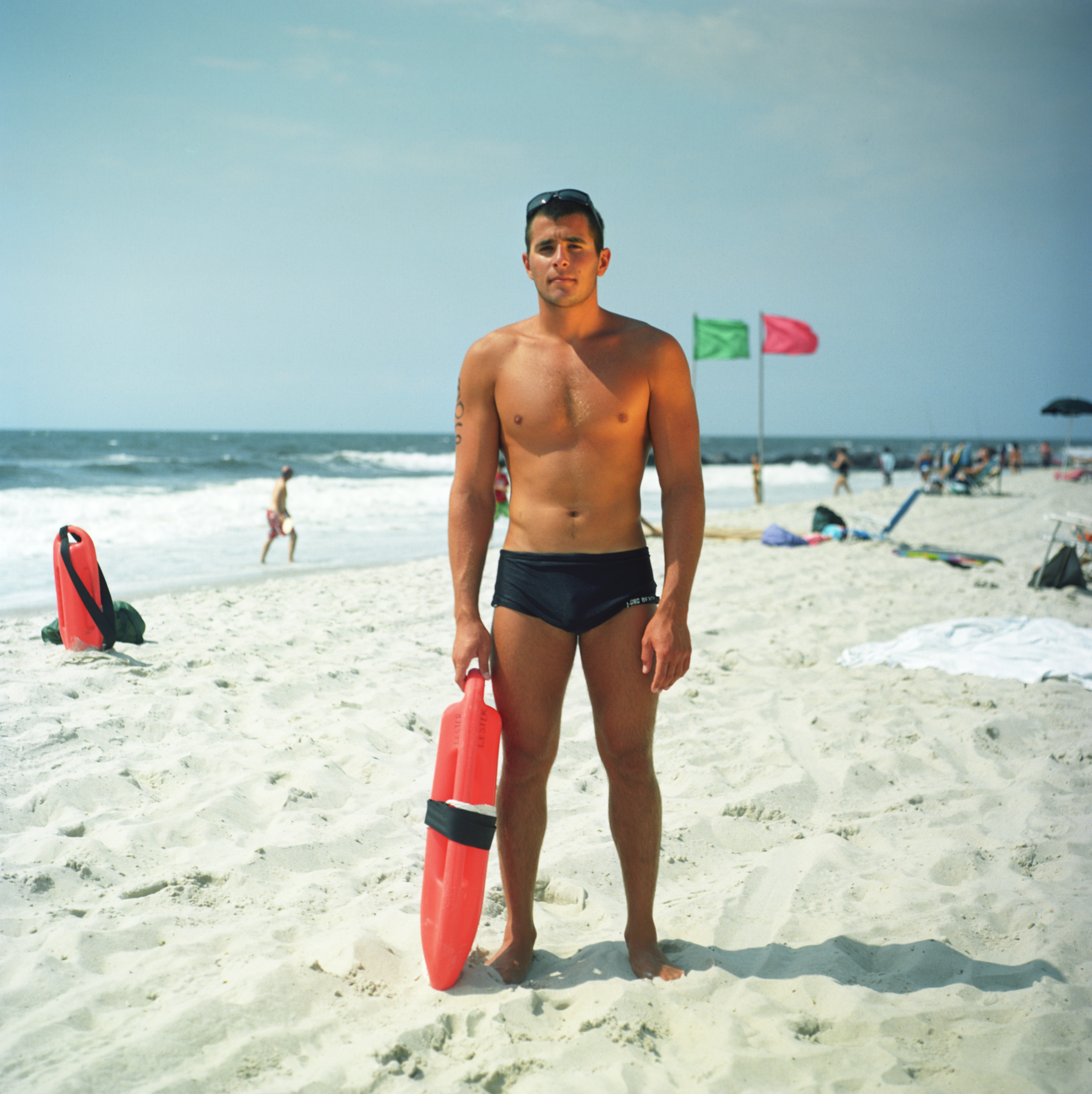 Lifeguards